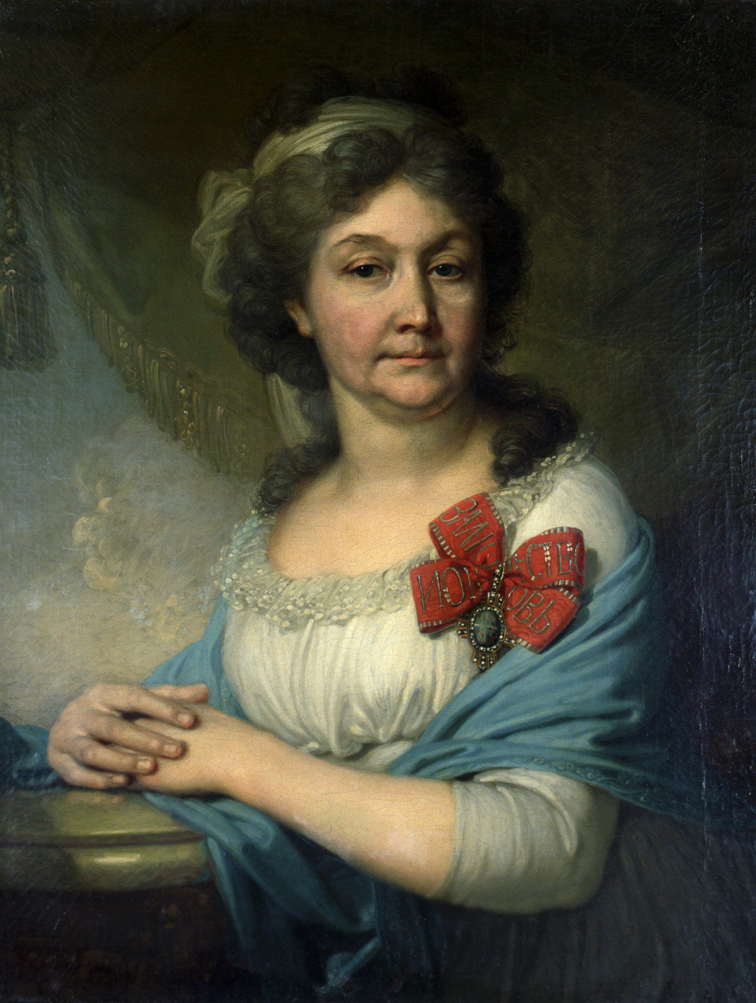 Васильева Варвара Сергеевна (1751-1831), урождённая Урусова